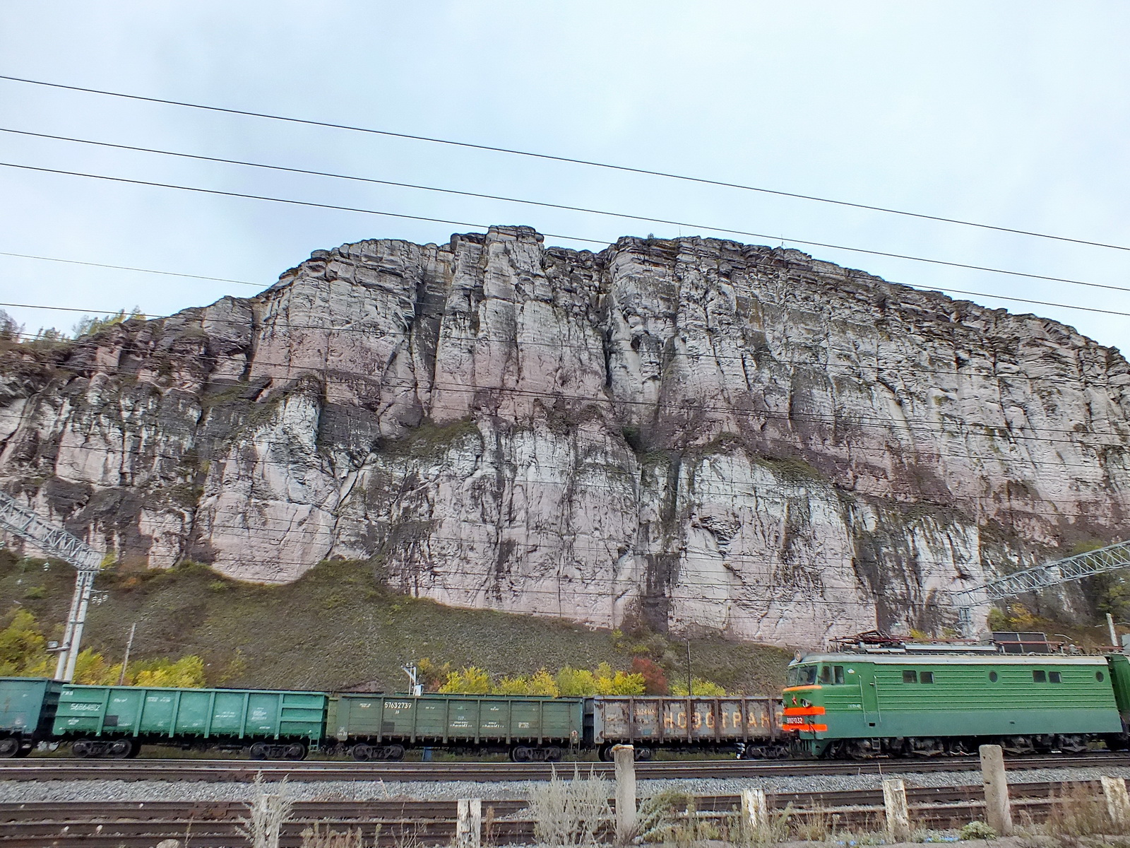 Красная скала в районе города Миньяр